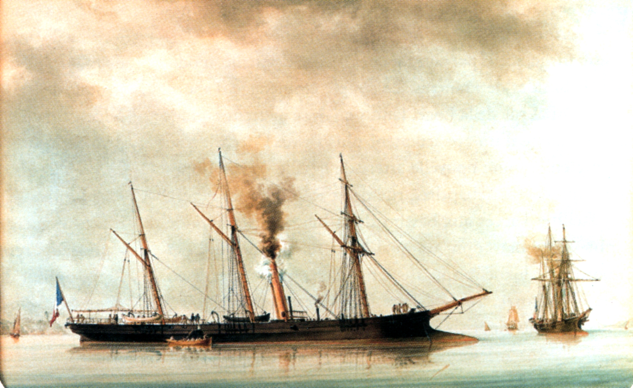 Photographie personnelle d'un tableau de 1846 de F. Roux